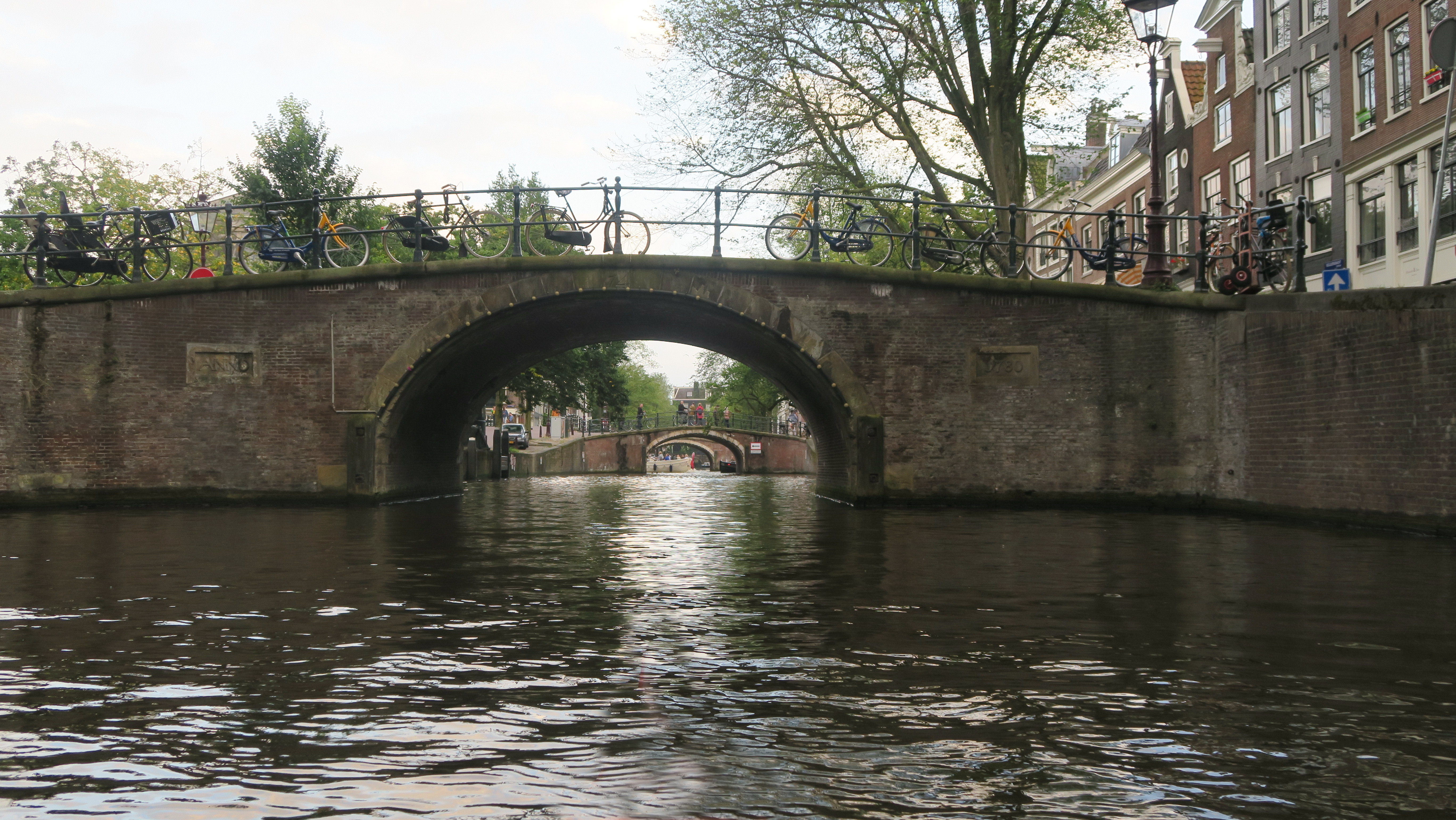 De Kerksluis (brug 74) gezien naar het zuiden met datumstenen